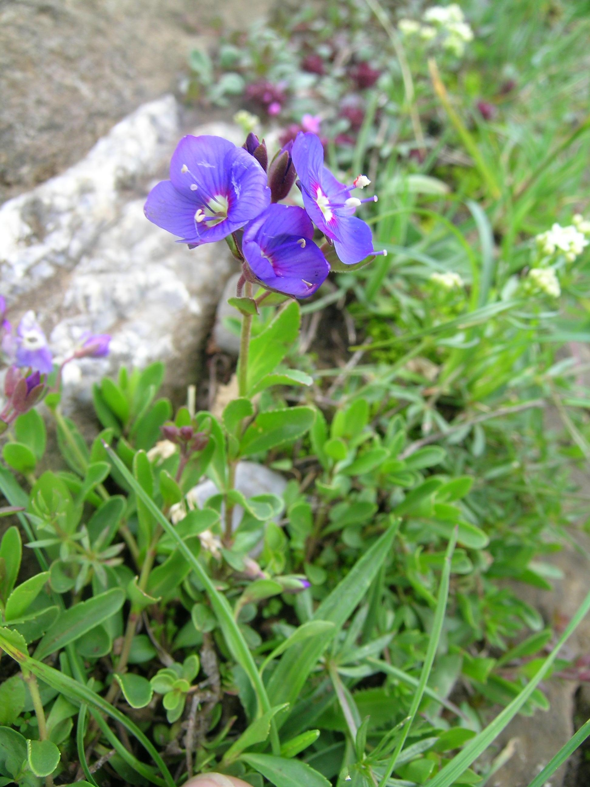 Veronica fruticans, Schynige Platte, Kanton Bern, Schweiz